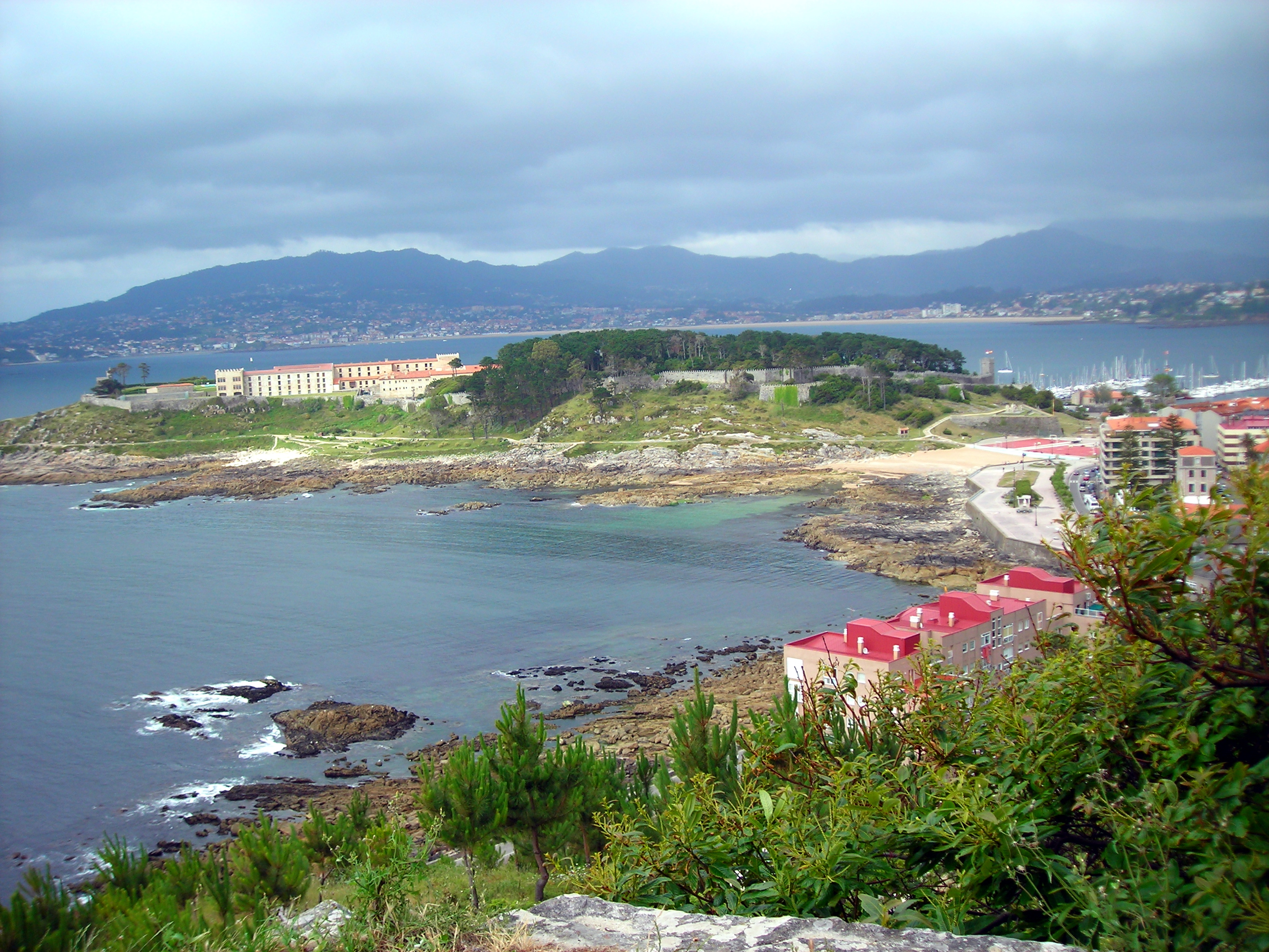 Fortaleza do Monte Boi desde Baiona.